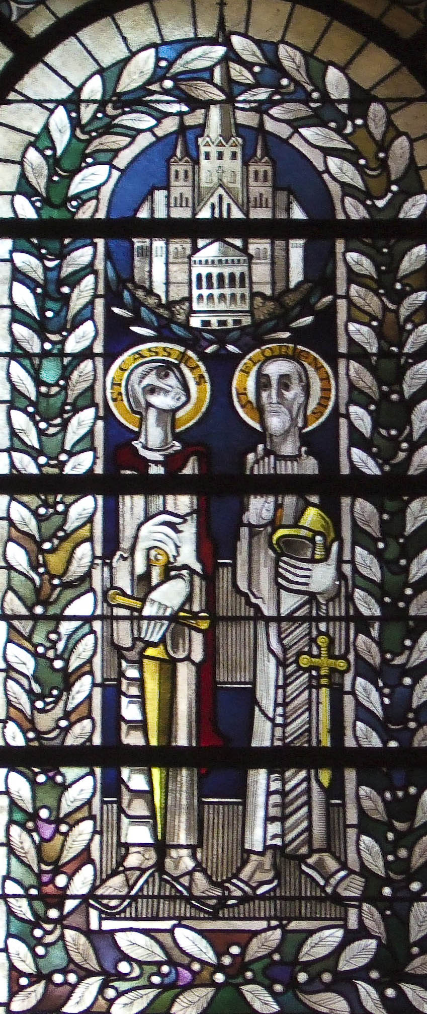 Paul Weigmann: Cassius und Florentius - Fenster im Bonner Münster